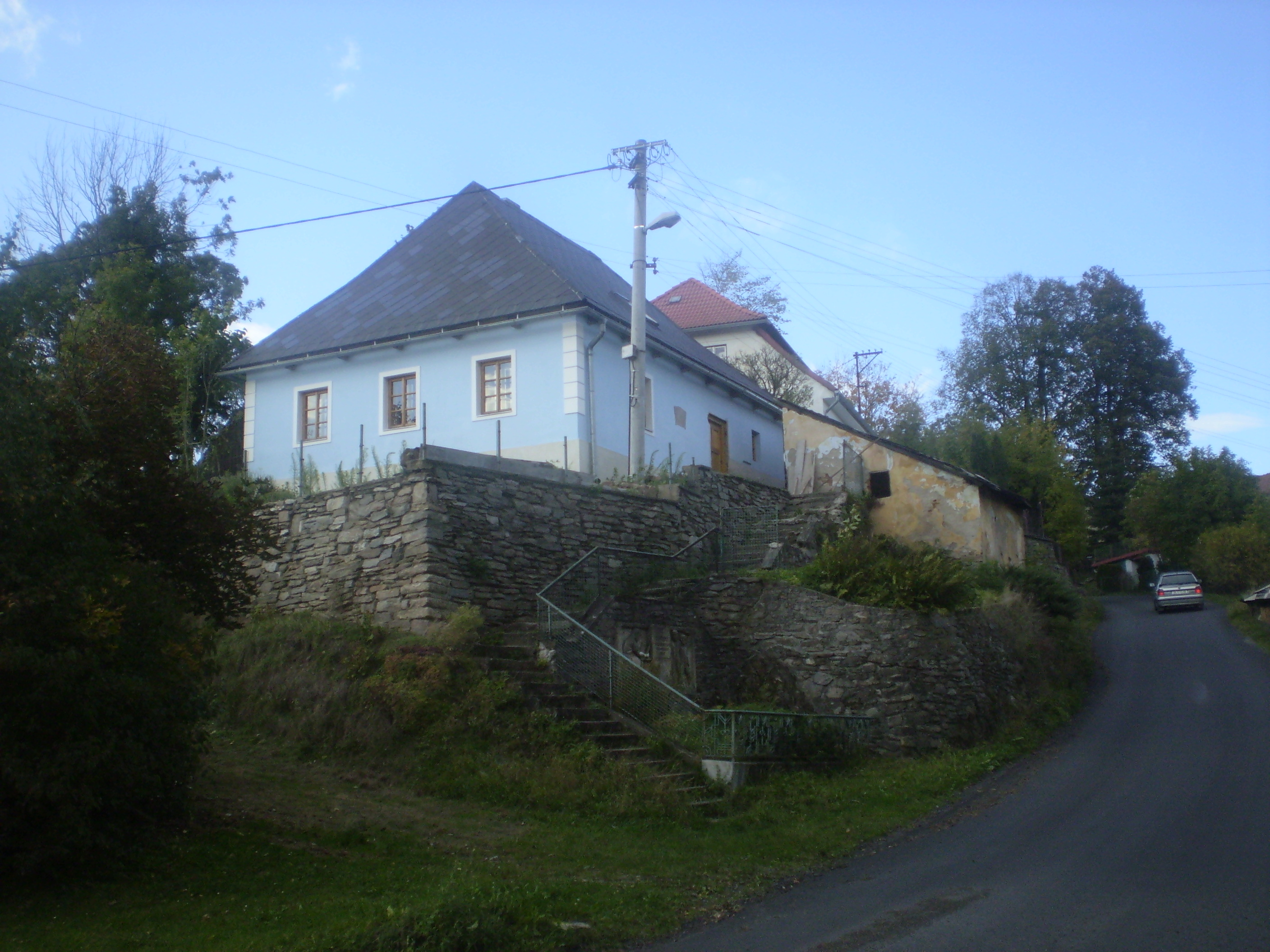 Rodný dům bratří Mrštíků v Jimramově